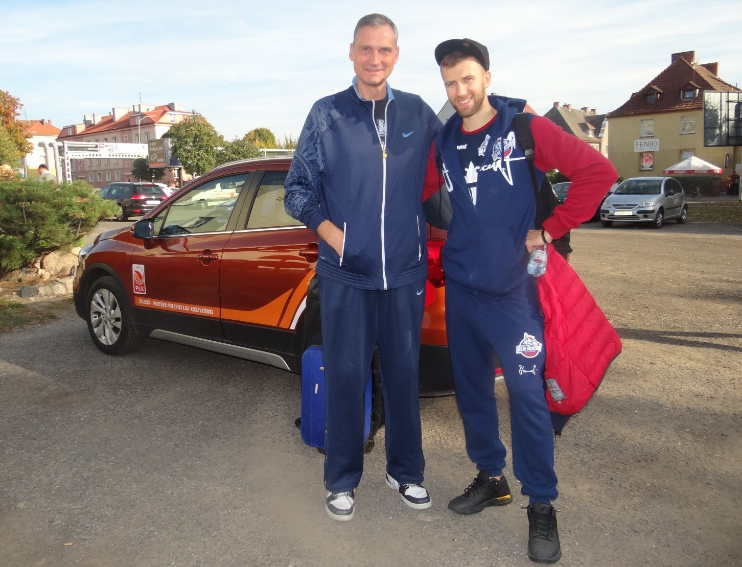 Stargard. Jankowski i Kikowski (06.10.2018)